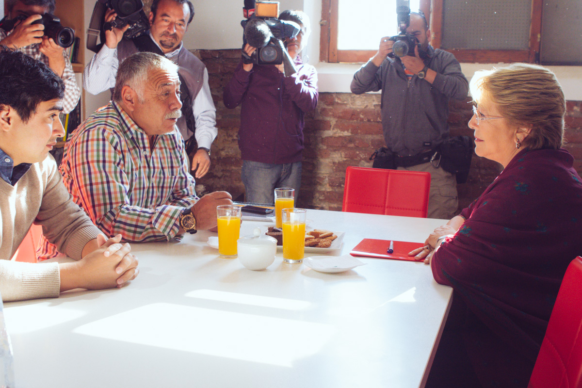 Carlos Caszely, exfutbolista chileno, entrega apoyo a Michelle Bachelet.